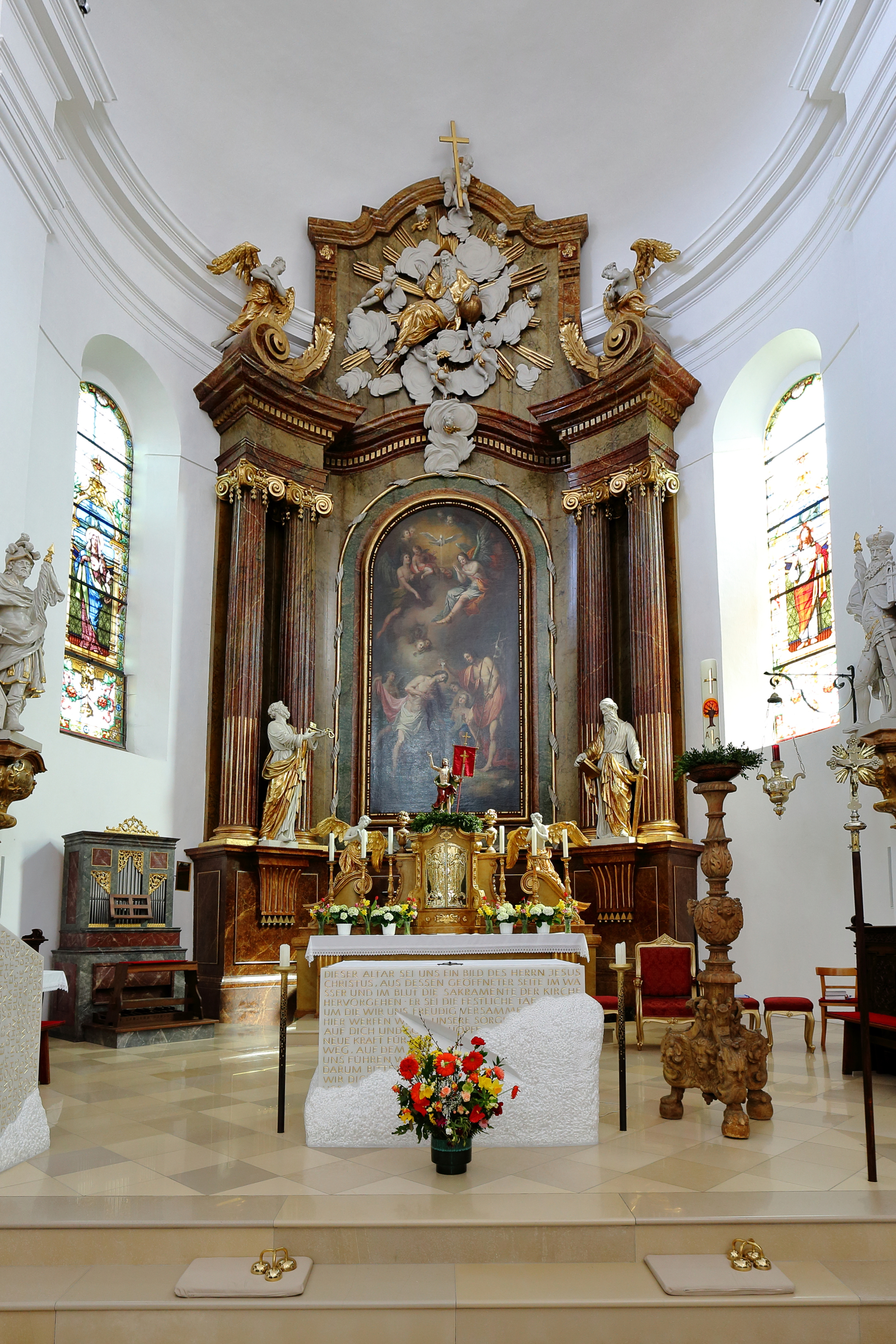 Hochaltar der römisch-katholischen Pfarrkirche hl. Johannes der Täufer in der niederösterreichischen Stadt Poysdorf.